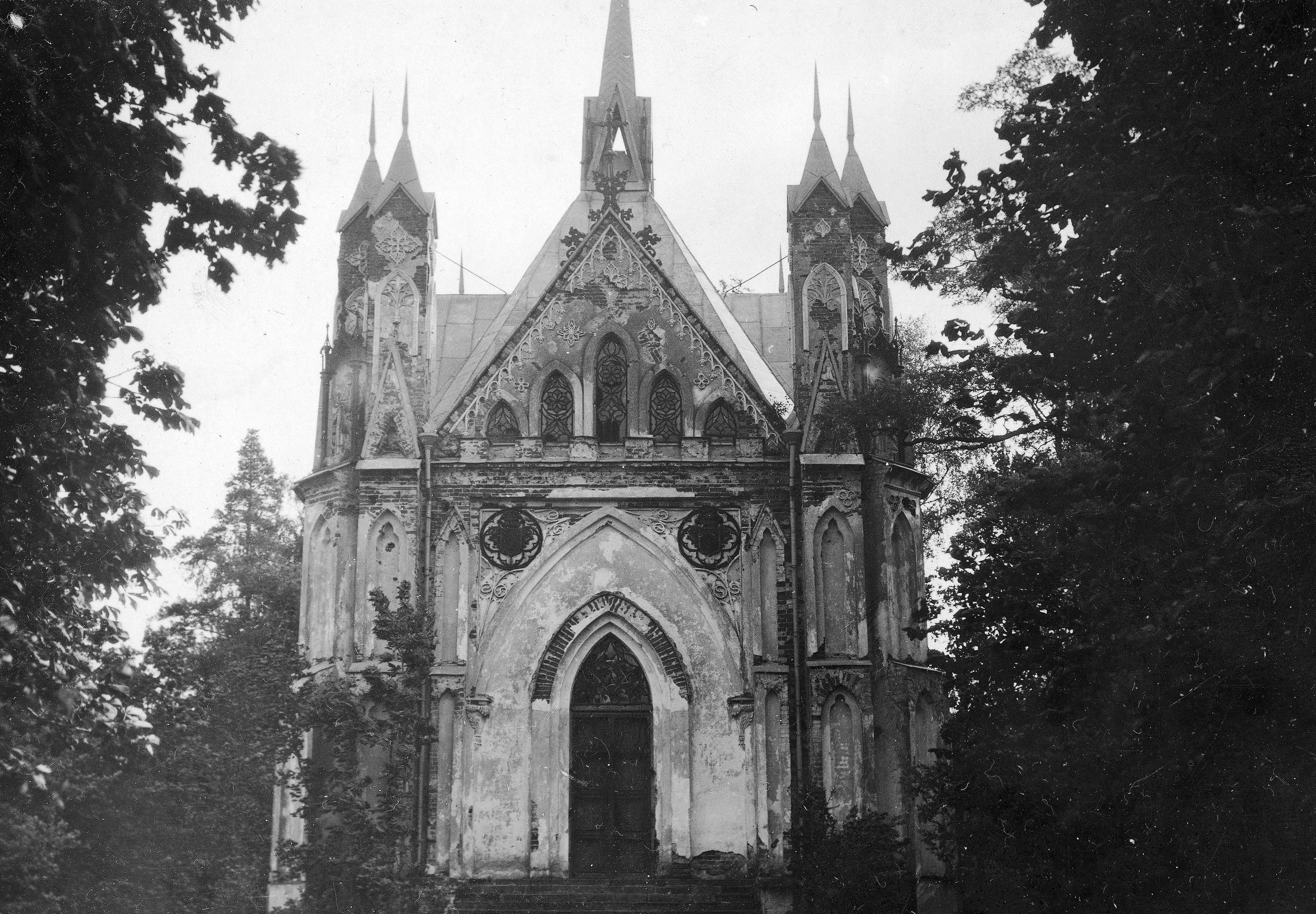 Беларуская (тарашкевіца): Закозель (Zakoziel). Капліца